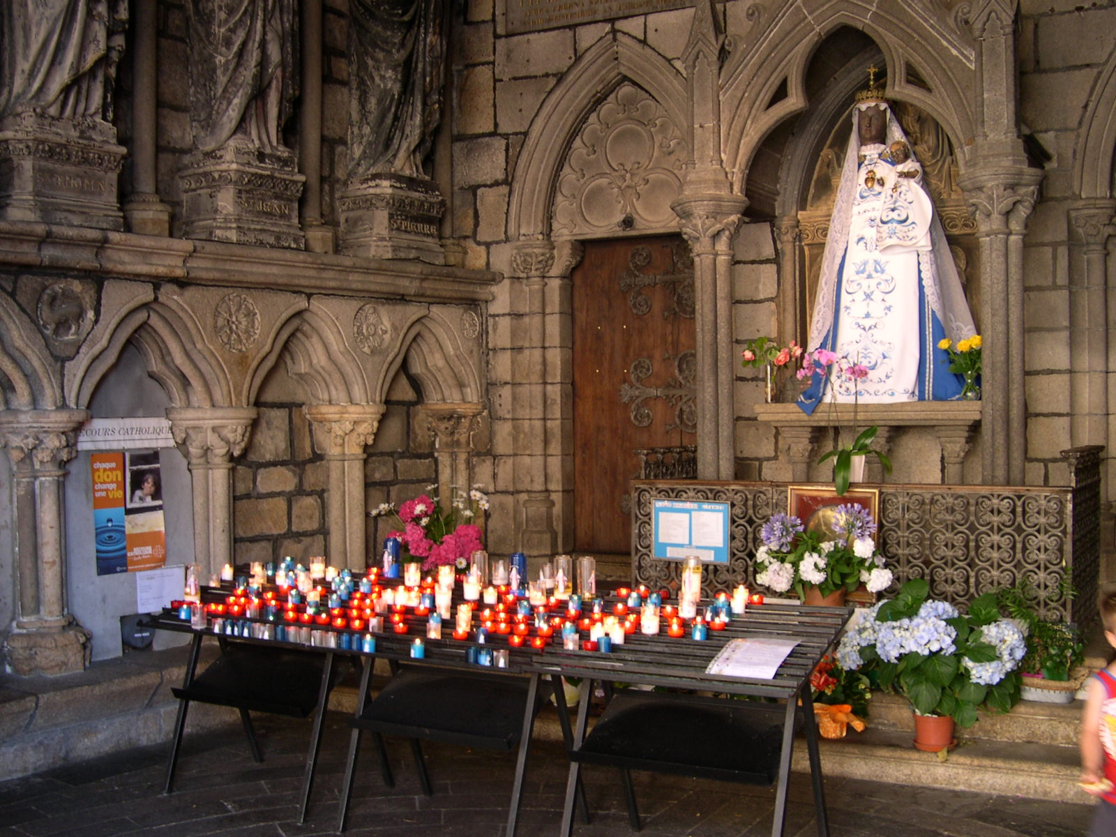 Porche nord et statue Notre-Dame-de-Bon-Secours de la basilique éponyme de Guingamp - Côtes-d'Armor - France .